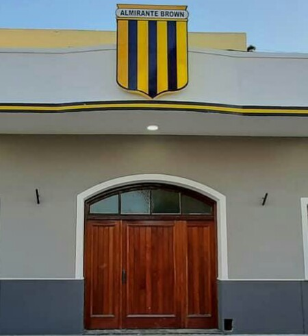 La histórica sede social de Almirante en el centro de San Justo, entrada principal.